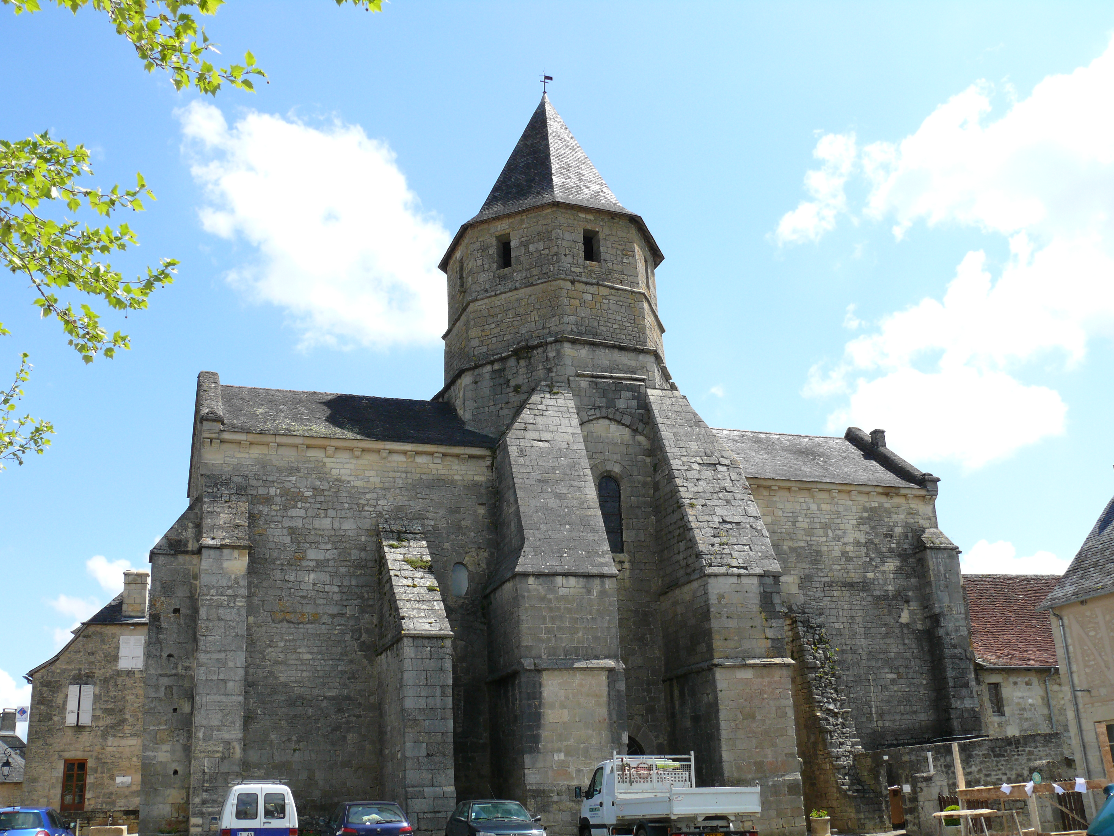 Saint-Robert - Eglise Saint-Robert - Confortement de la croisée du transept après la démolition de la nef